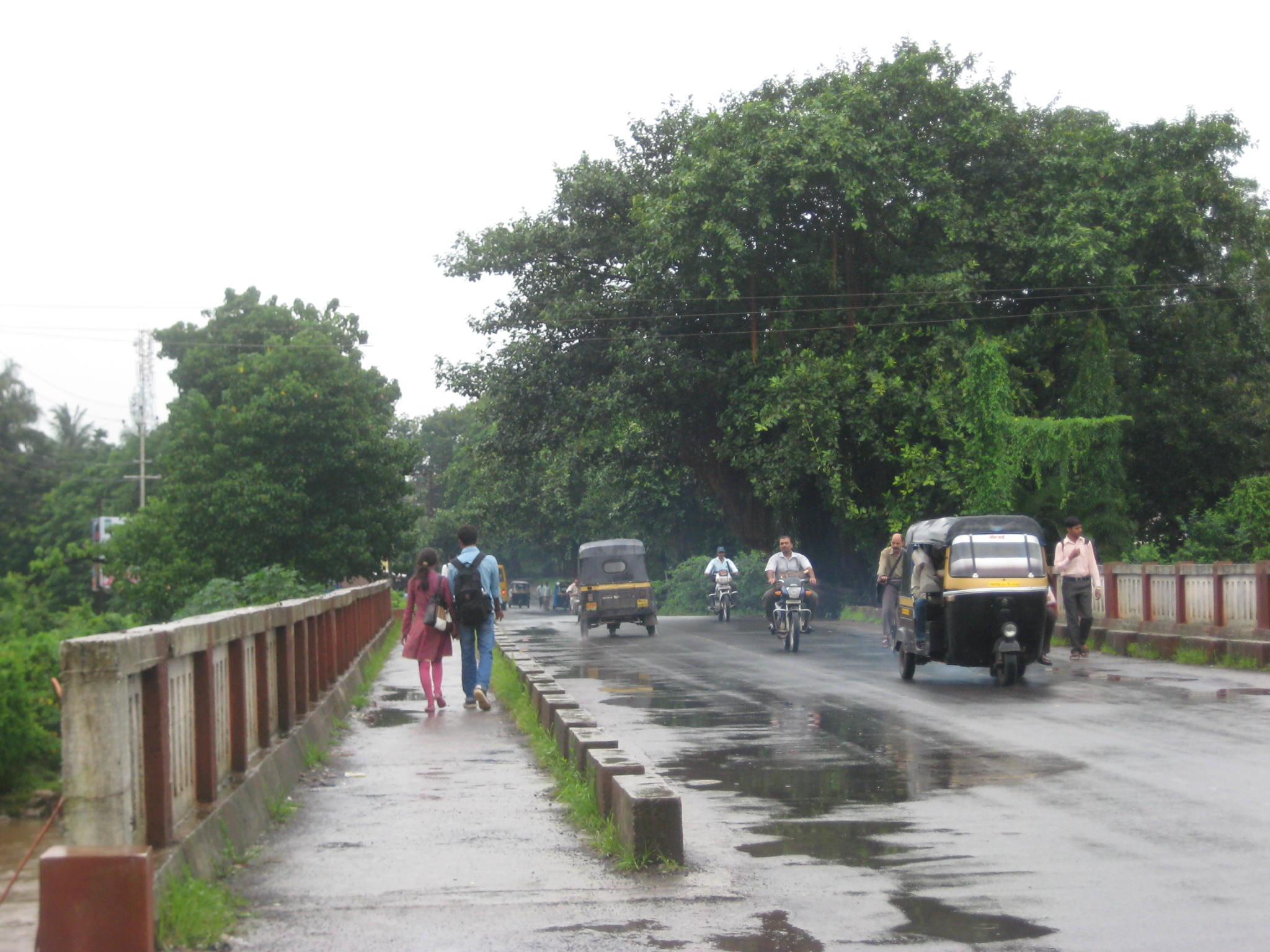 Dahanu Bridge near Janta Bank, Dahanu Road